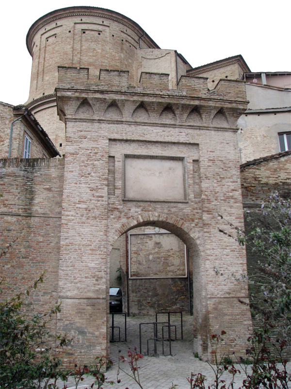 Porta San Giuliano, Macerata, Italy (XVI c.)